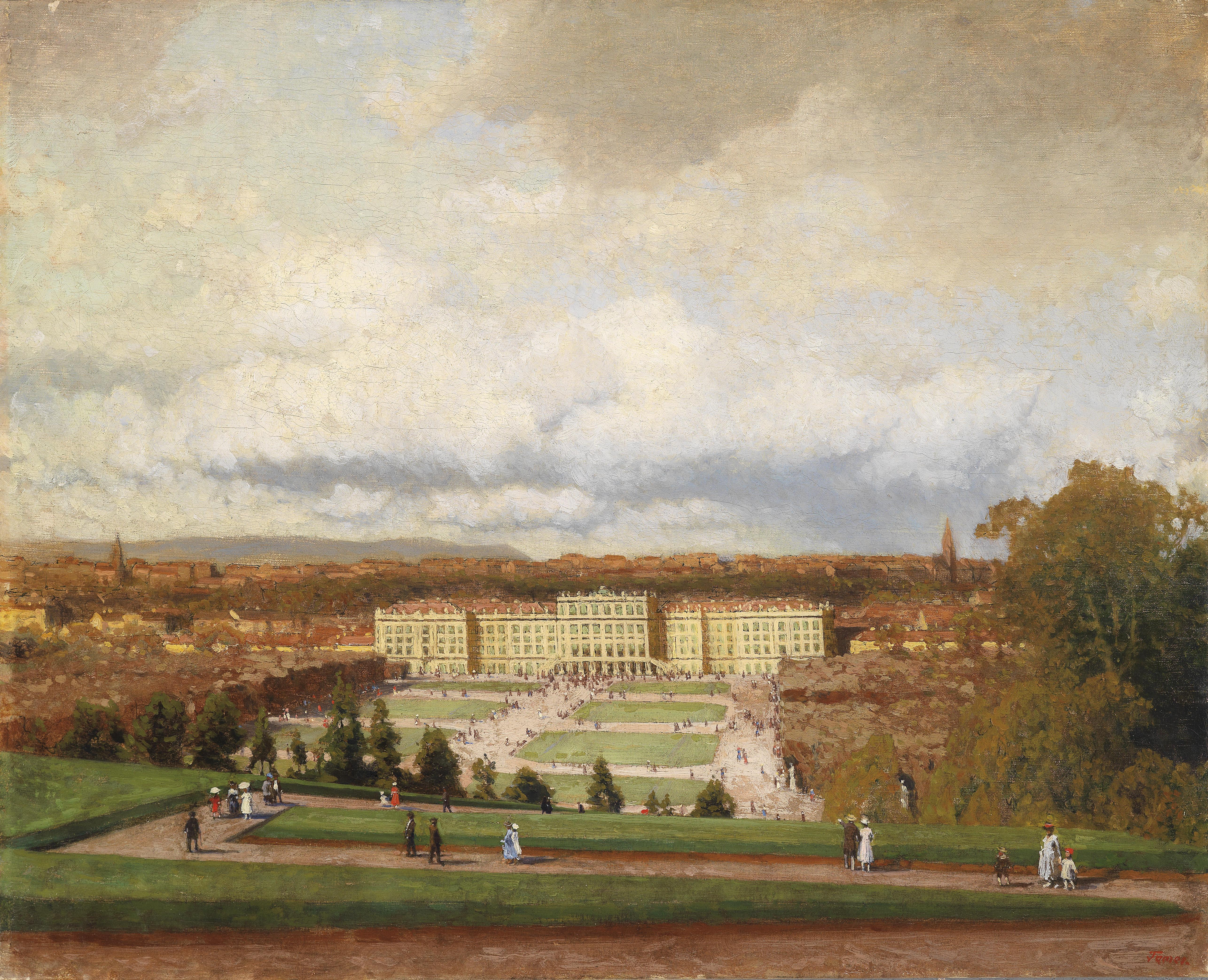 Blick von der Gloriette auf Schloss Schönbrunn, signiert Tomec, Öl auf Leinwand, 65 x 80 cm